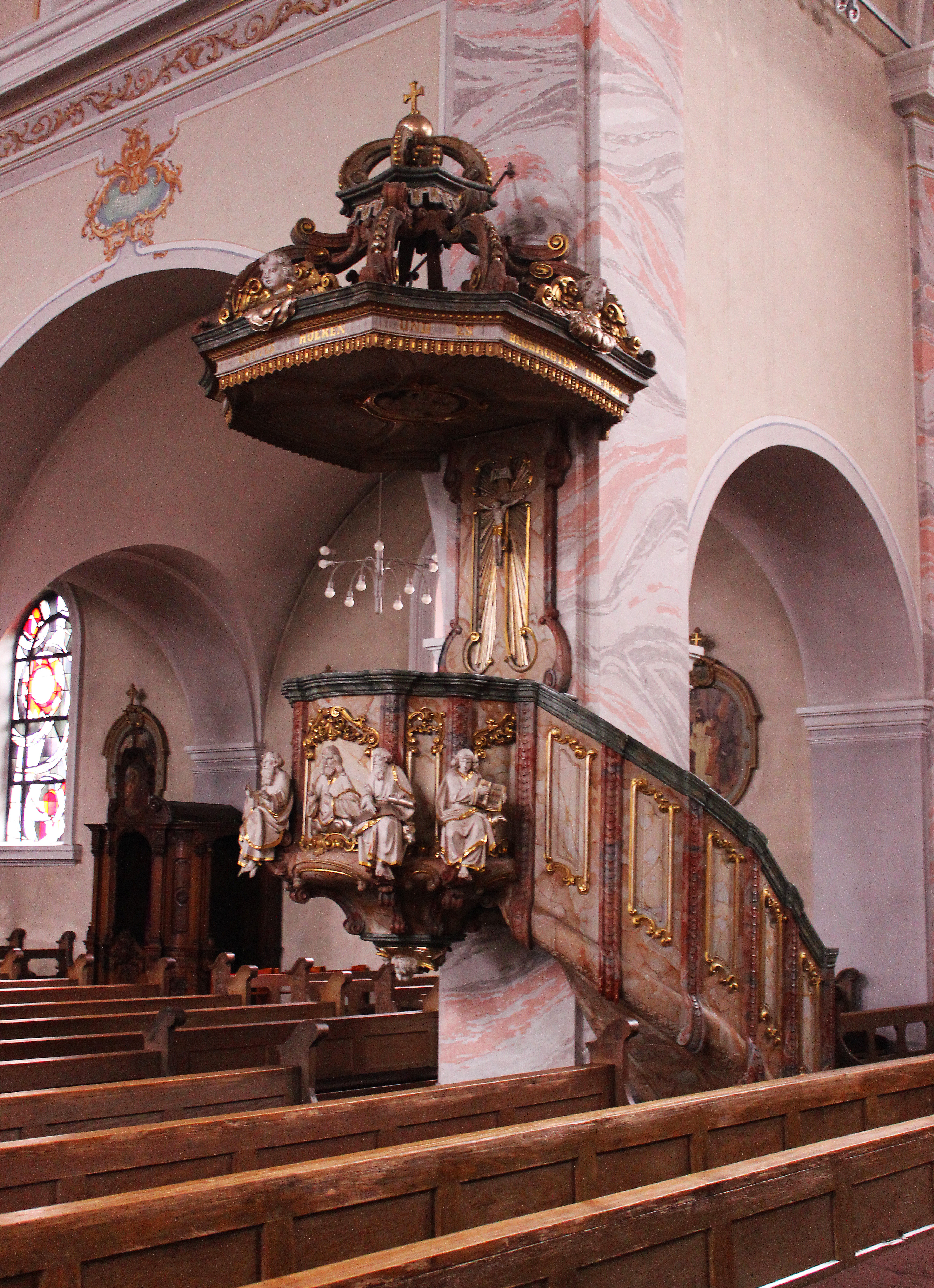 Kanzel der katholischen Pfarrkirche St. Laurentius in Hülzweiler, einem Ortsteil der Gemeinde Schwalbach, Landkreis Saarlouis, Saarland